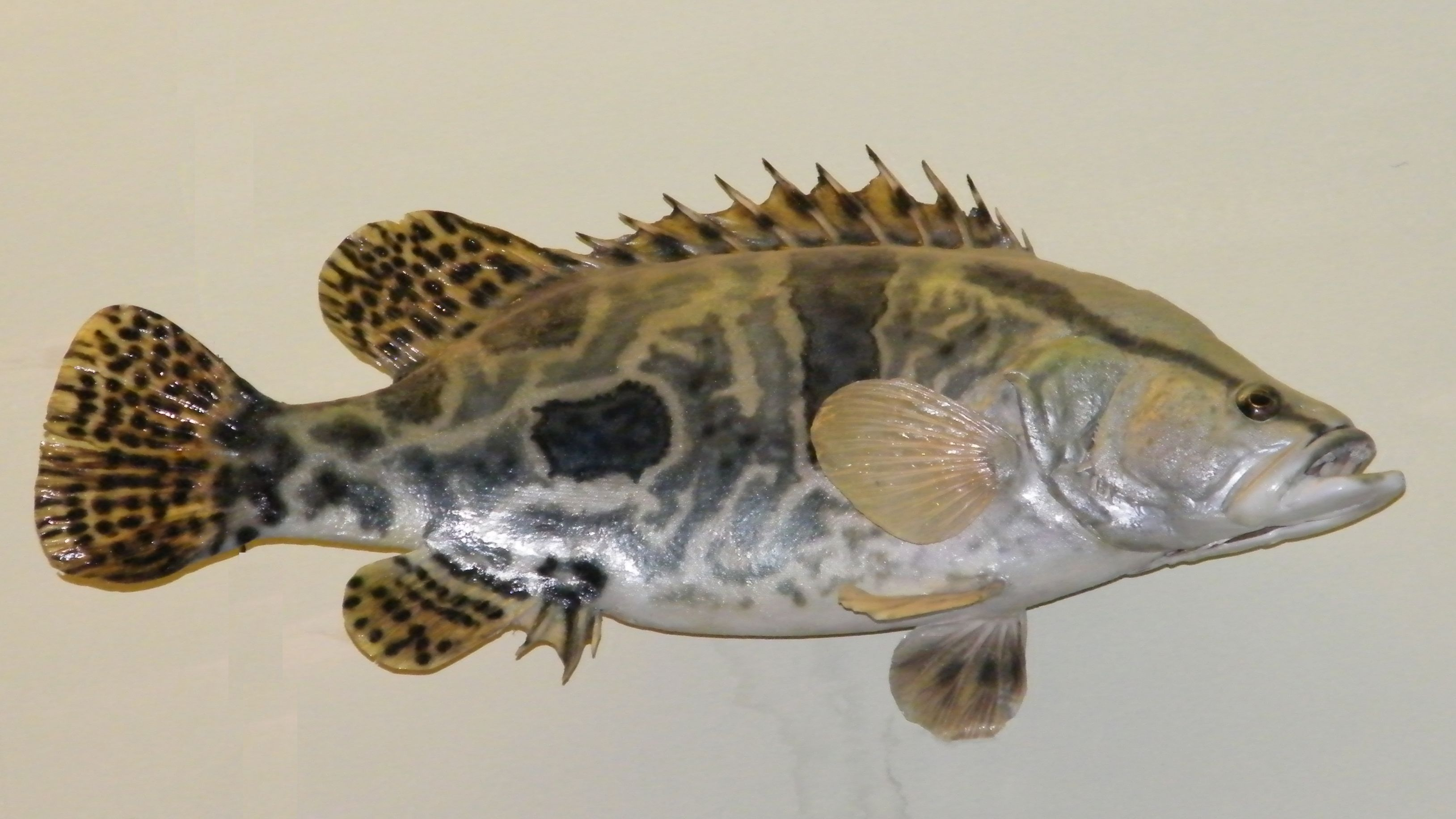 Китайский окунь - ауха (лат. Siniperca chuatsi)